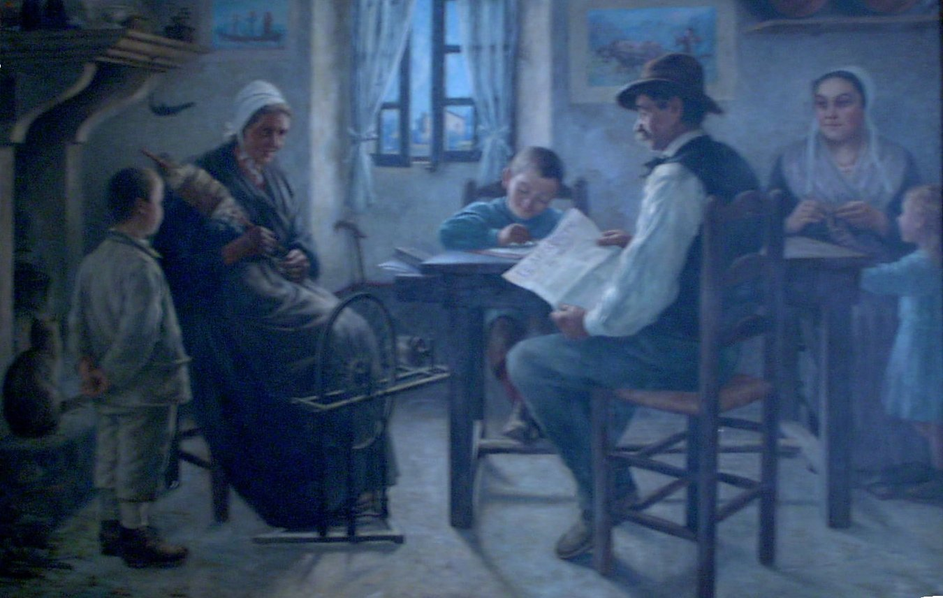 Tableau de Benoni Auran situé dans la salle des mariages de Monteux